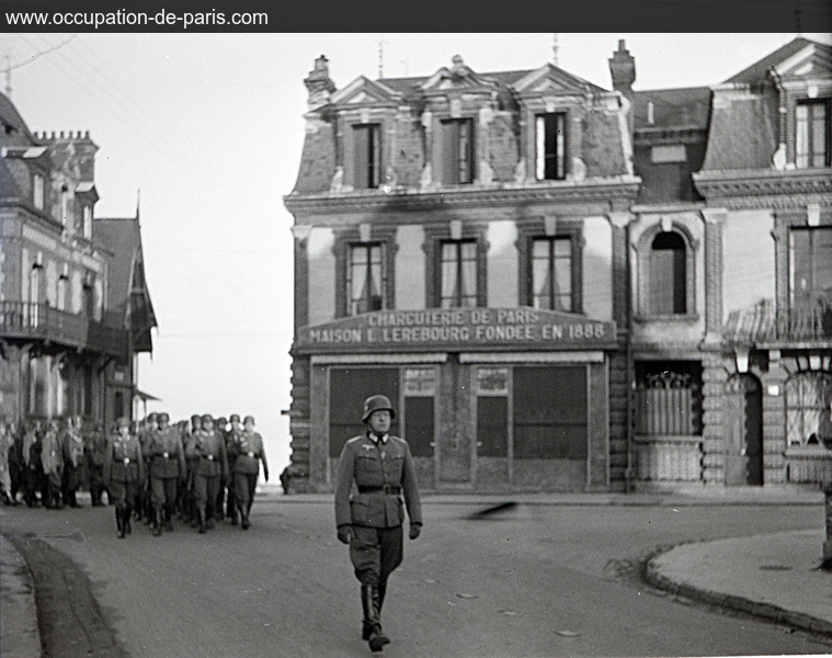 Parade fanfare allemande rue des bains à Houlgate 1941